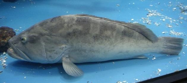 Epinephelus bruneus(クエ)@Nagasaki Penguin Aquarium(長崎ペンギン水族館)